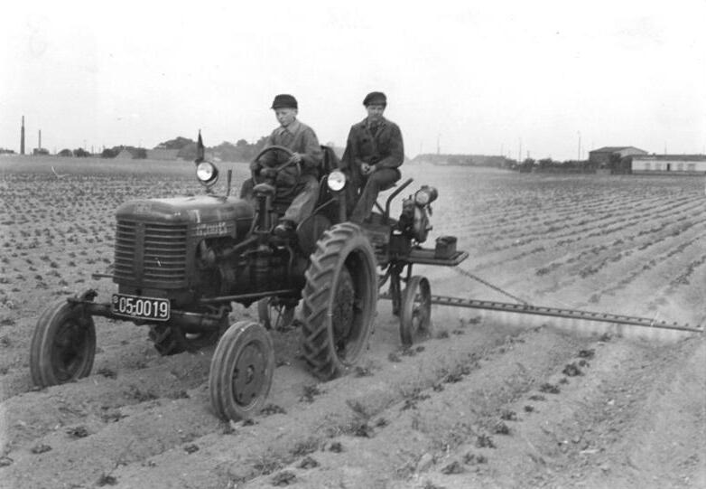 MTS Wolkenitz, Kartoffelkäferbekämpfung Zentralbild Siegert 5.6.1953 Wirksame Kartoffelkäferbekämpfung sichert die Ernte. Der Kartoffelkäfer mit seinen Larven und Eigelegen ist in den letzten Jahren so stark aufgetreten, daß er eine ernste Gefahr für den gesamten Kartoffelanbau und damit für die Versorgung unserer Bevölkerung darstellt. Deshalb führen die Kollegen der MTS Wolkenitz, Kreis Riesa, die Kartoffenkäferbekämpfung gemäss der Verordnung des Ministerrates umfassend durch. Mit einer Schaumnebelspritze PSN 6, die von einem sowjetischen Geräteträger gezogen wird, rückt man den Schädlingen zu Leibe. Der 16-jährige Traktorist Fritz Krönert, einer der Besten der Station, bearbeitet so täglich durchschnittlich 15 Hektar.